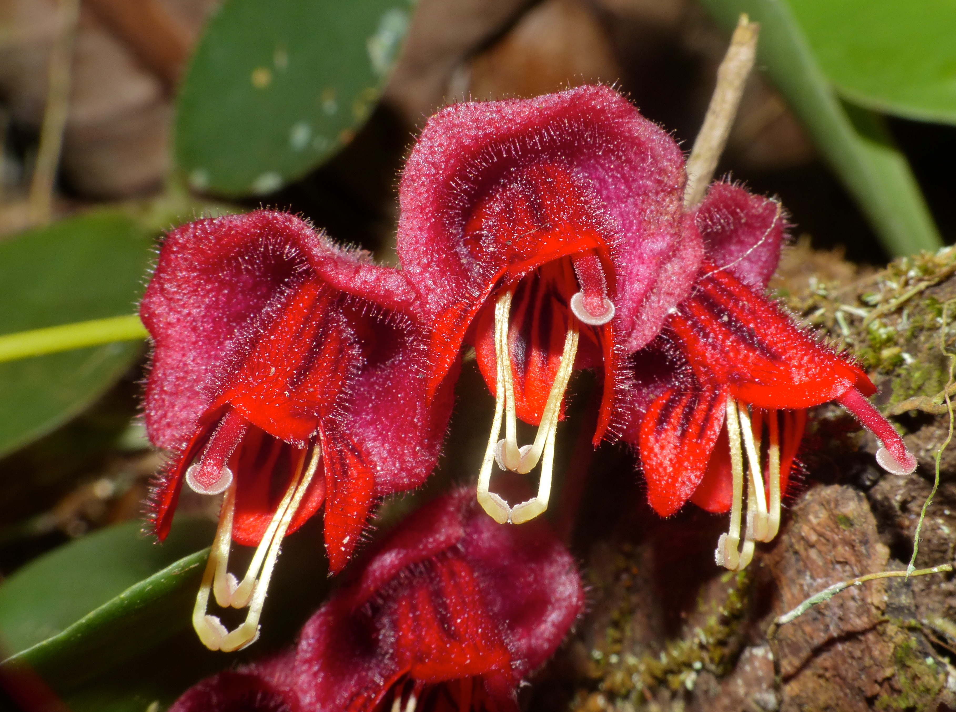 Mulu NP Headquarters, Sarawak, MALAYSIA